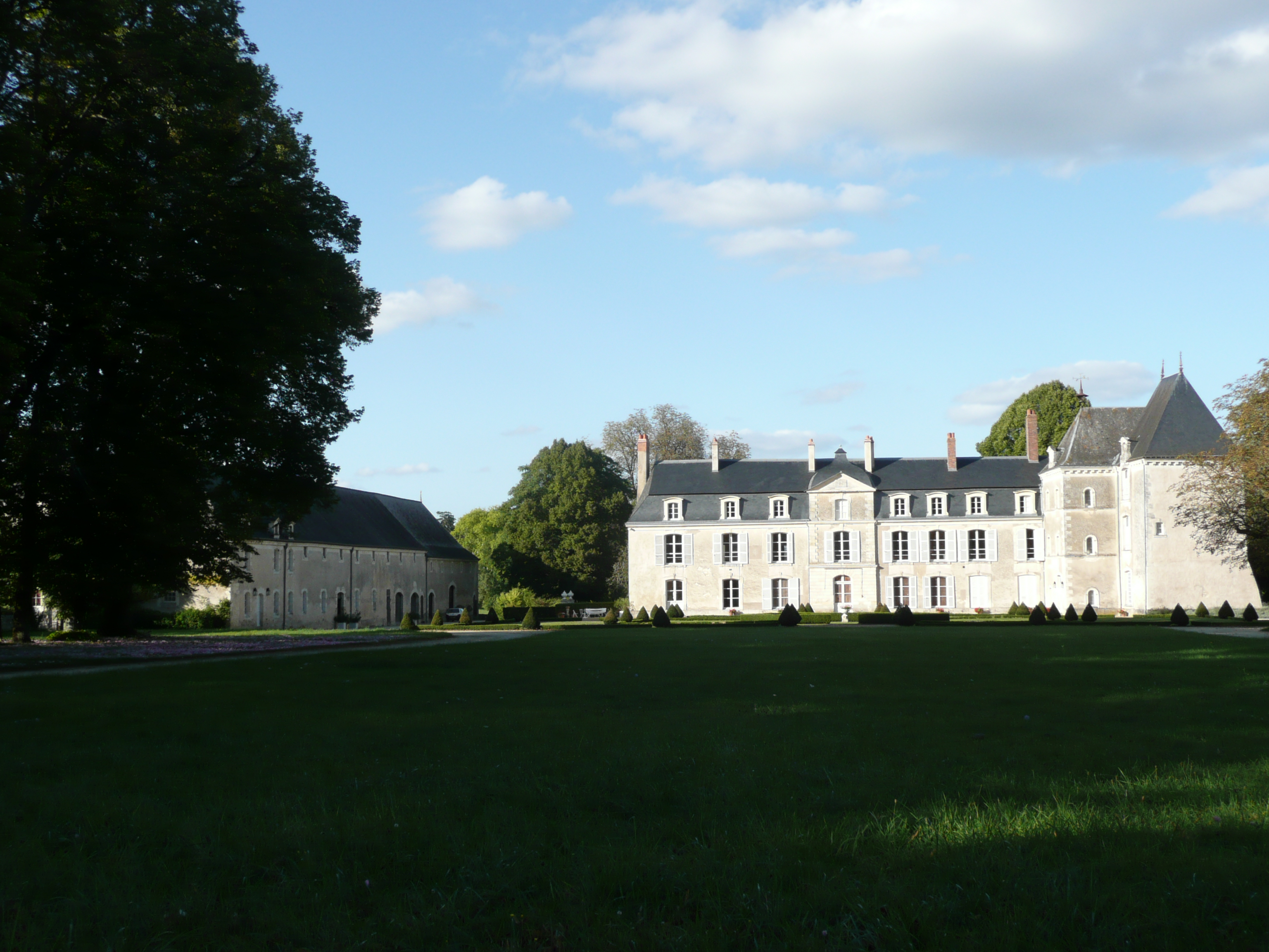 Lasse - Château du Bouchet This building is en partie classé, en partie inscrit au titre des Monuments Historiques. .